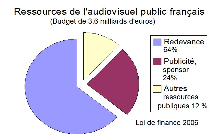 ressources audiovisuel